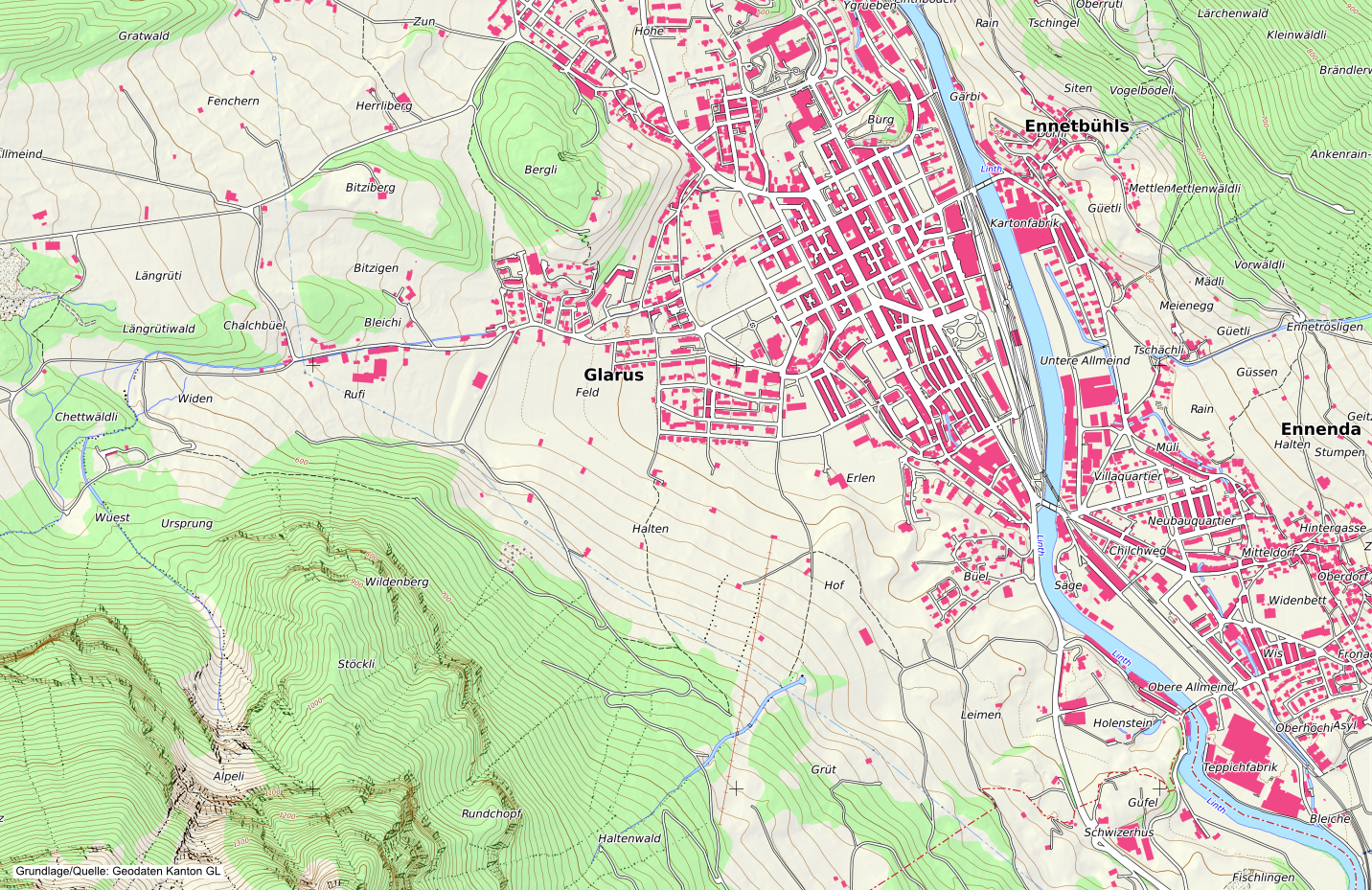 Basisplan farbig der amtlichen Vermessung in der Generalisierung 1:10'000, Ausschnitt Glarus/Kanton Glarus/Schweiz